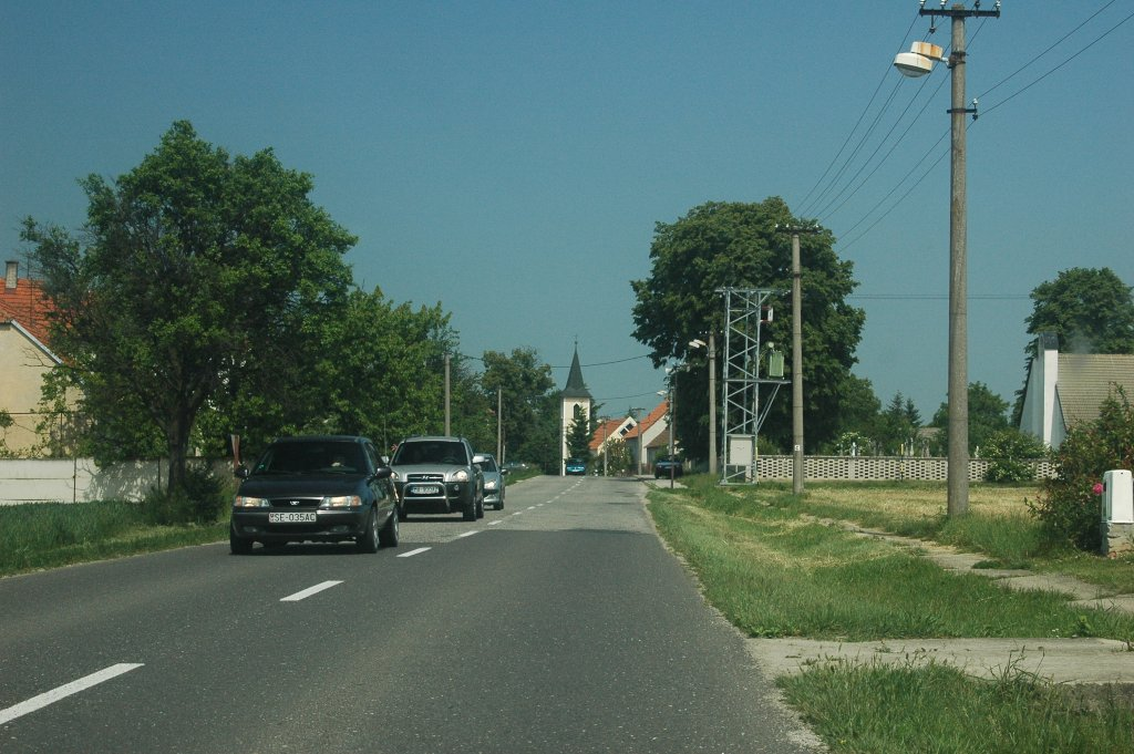 Rybky